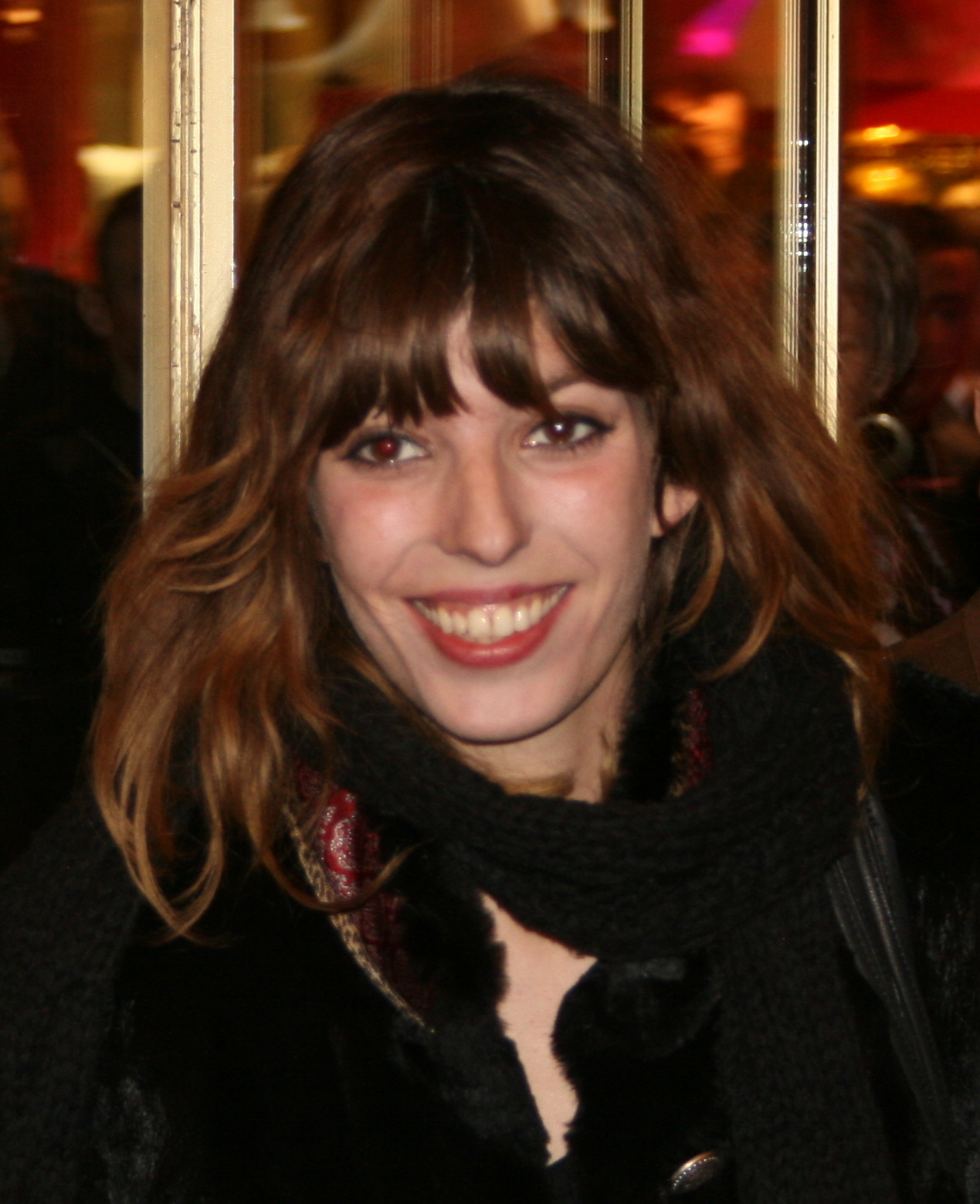 French actress Lou Doillon